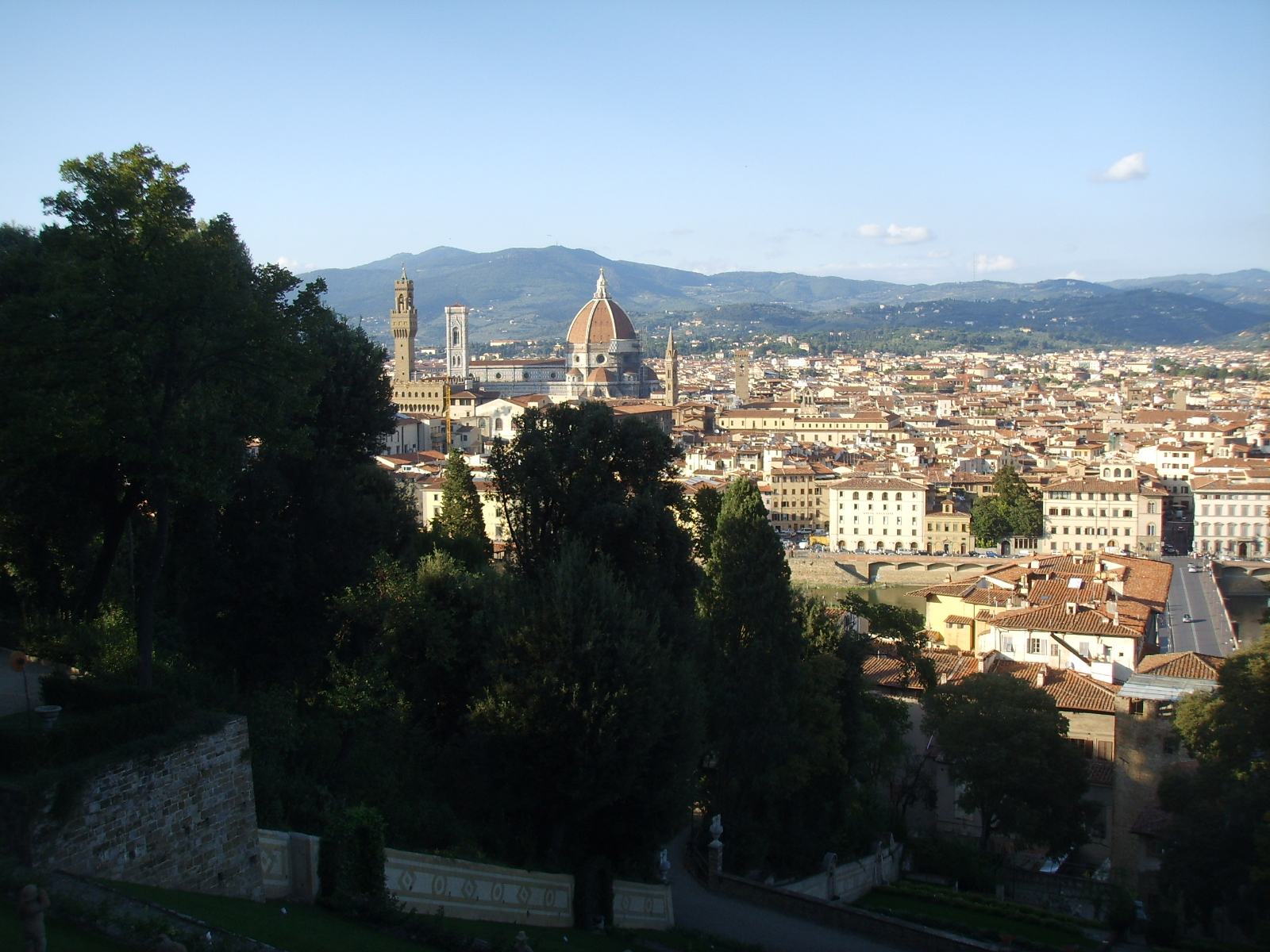 Giardino bardini, panorama